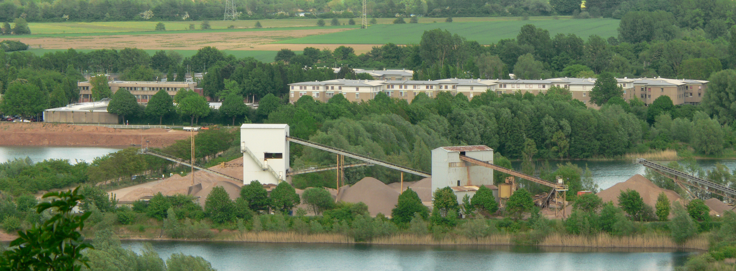 Jugendanstalt Hameln vom Ohrberg gesehen